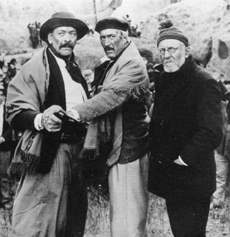 La Patagonia Rebelde, 1974. De izquierda a derecha: Jorge Villalba (el Gaucho Florentino Cuello), Federico Luppi (Facón Grande), Pepe Soriano (el alemán Schultz)